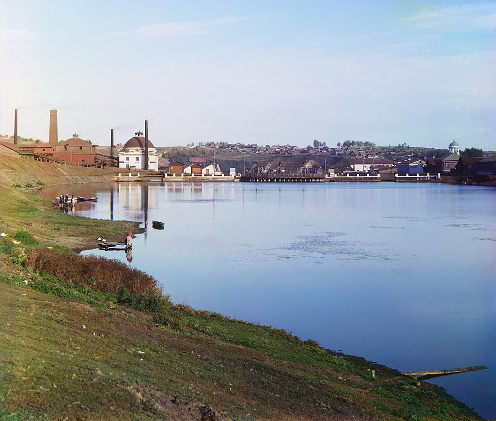 С. М. Прокудин-Горский. Общий вид Каменского завода с запрудою. 1909 год